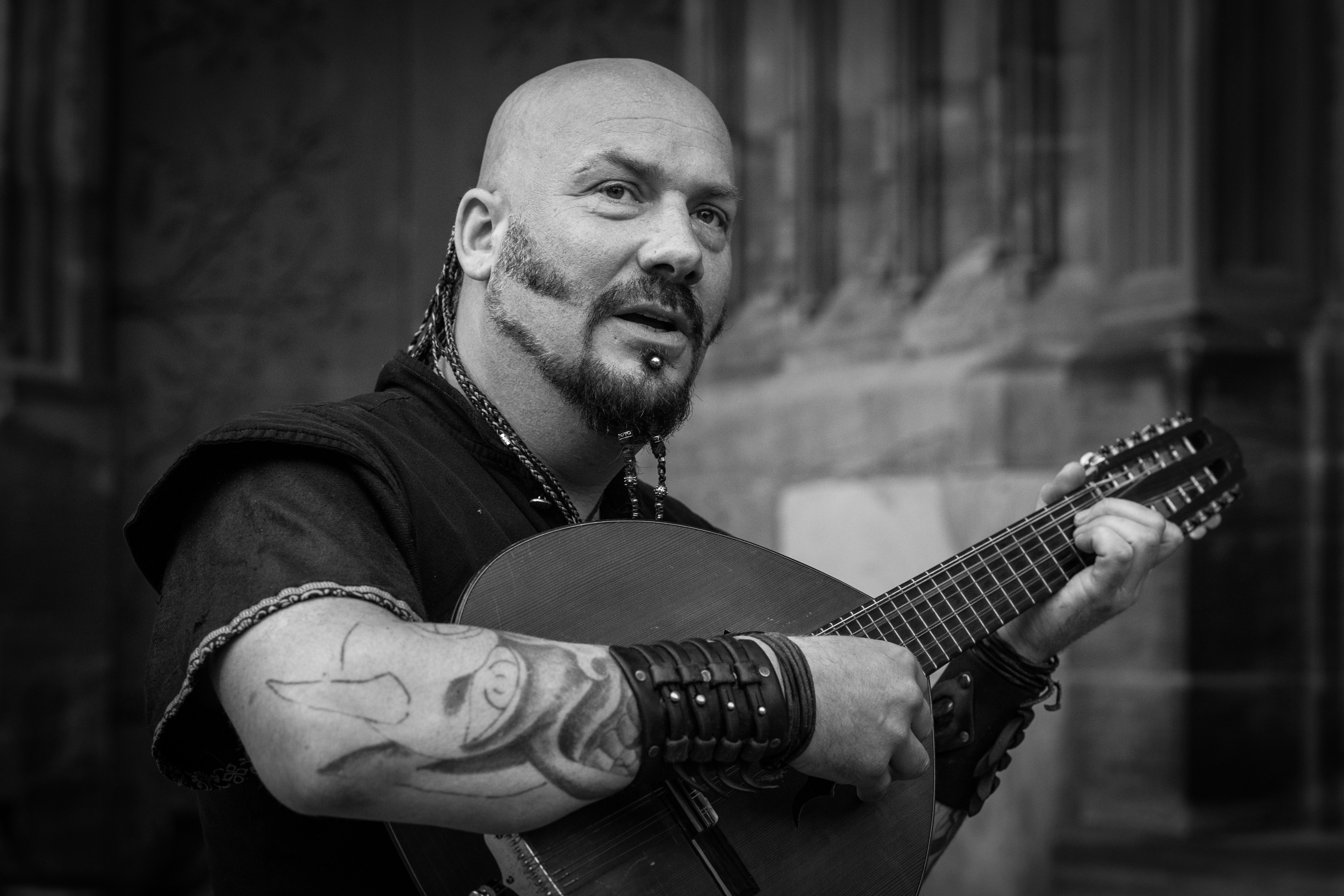 Luc Arbogast devant la cathédrale Notre-Dame de Strasbourg le 21 avril 2016.